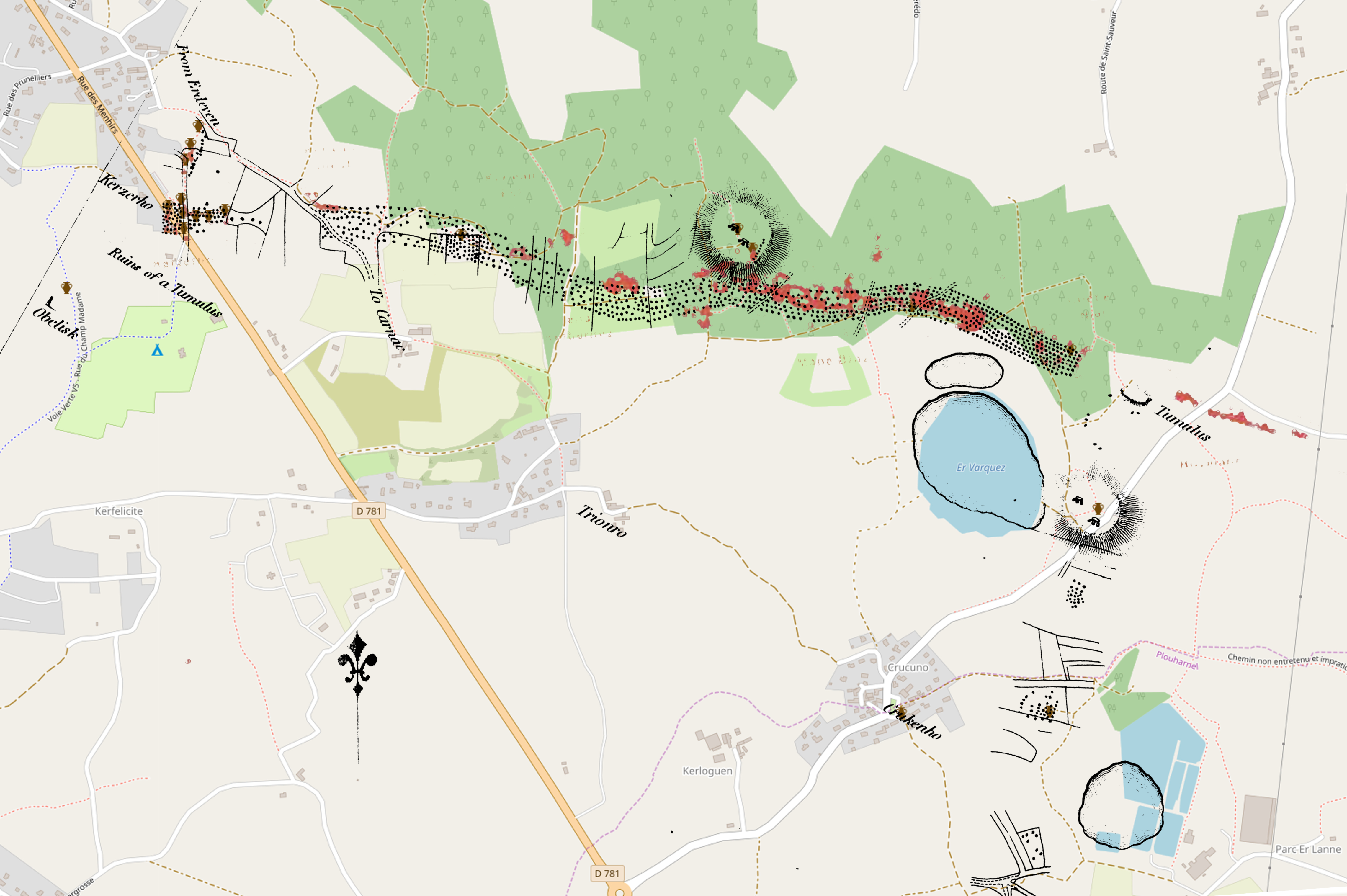 Superposition approximative d'après le relevé de 1832 de Murray Vicars (considéré comme le premier plan général des mégalithes de la région de Carnac) publié dans John Bathurst Deane, Observations on Dracontia, in Archaeologia: Or Miscellaneous Tracts Relating to Antiquity, 25, plate XX, after p 202 : « Plan of the Dracontium of Carnac. Surveyed April 1832 ». sur un fond OSM. Les points rouge, correspondant approximativement aux mégalithes toujours en place, s'inspire du relevé réalisés lors de l'inventaire mégalithique sur la forêt départemental d'Erdeven et ses environs par le Service régional de l'archéologie de Bretagne et l'ONF publ. en sept 2007, sous la dir. de Cécile Dardignac.